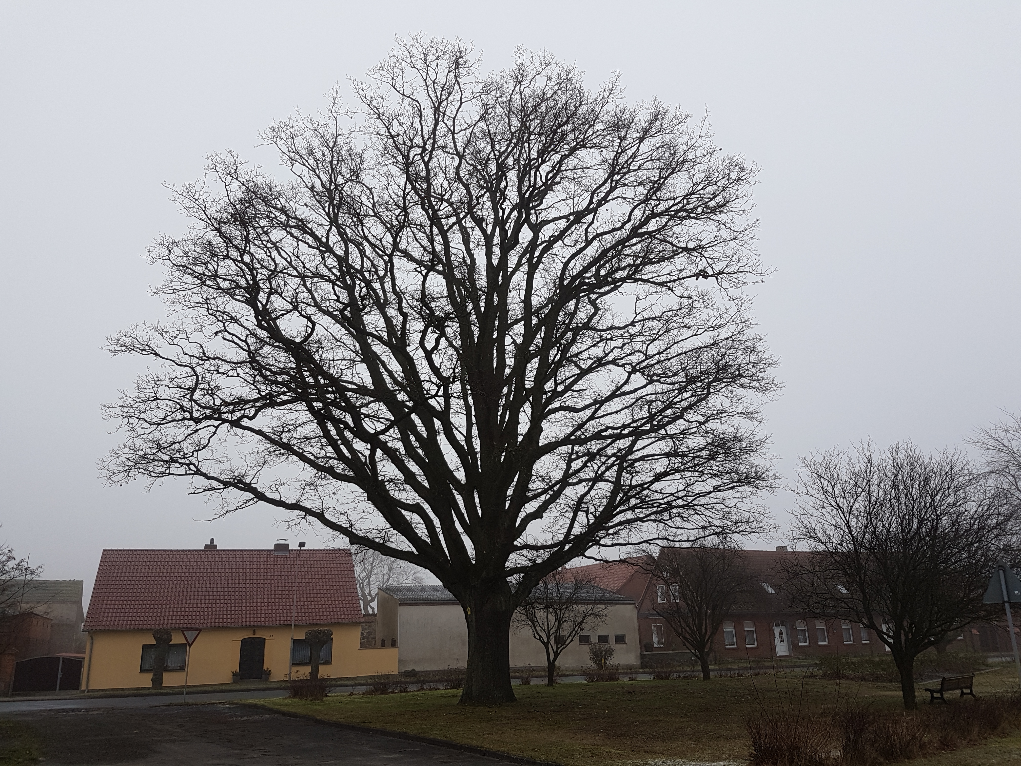 Als Naturdenkmal geschützte Eiche in Wulfersdorf (Wittstock-Dosse)